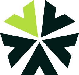 滋慶医療科学大学院大学ロゴ